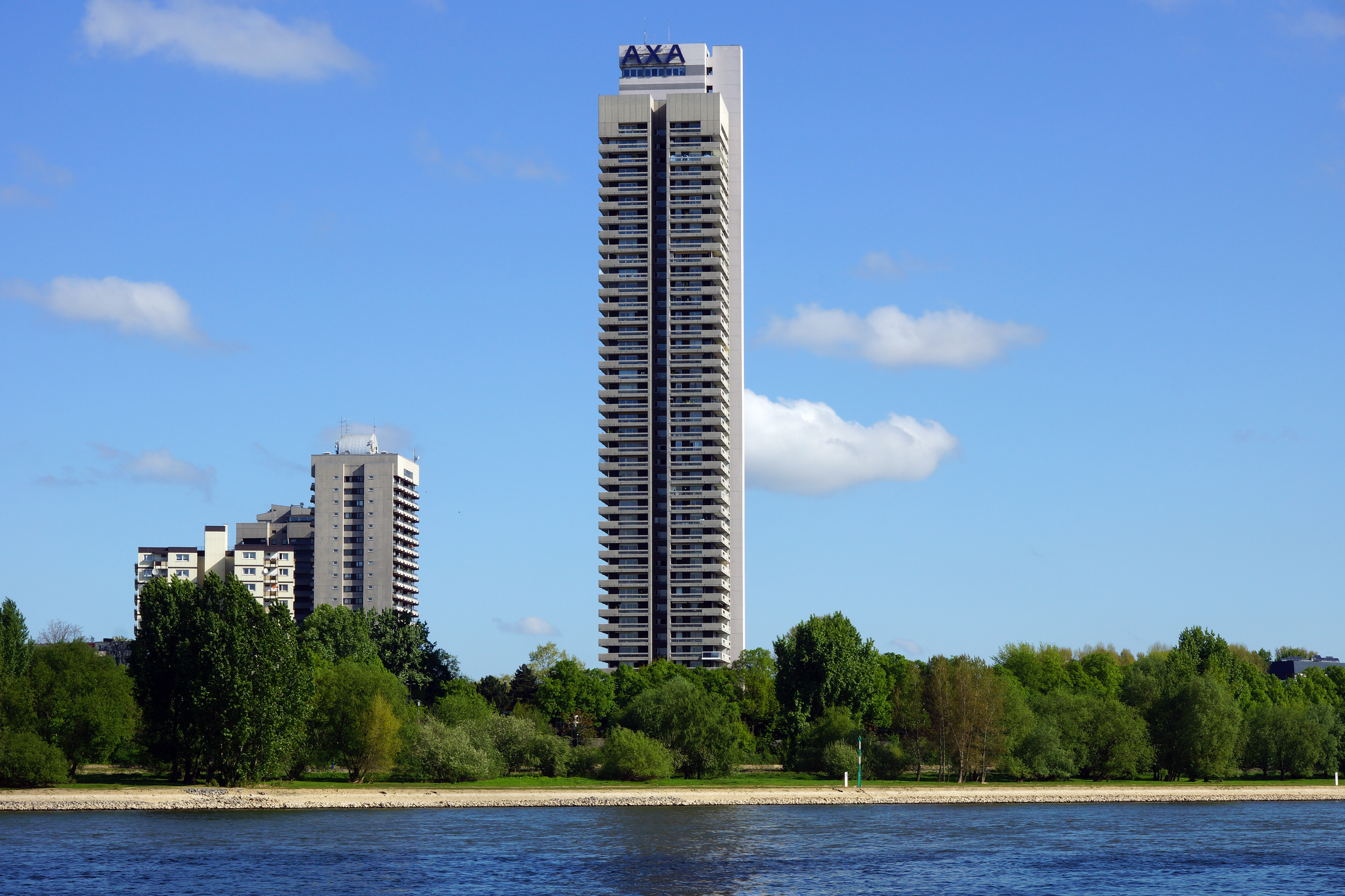 Das Colonia-Haus in Köln.